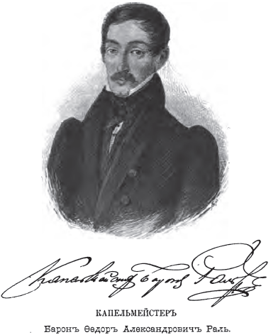 Ral, F.A. (1802-1848) - the Russian musician